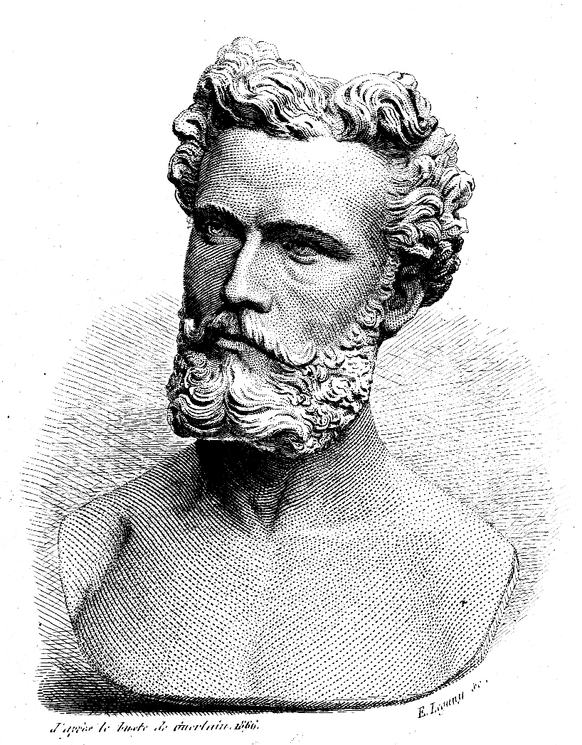 Illustration parue dans le livre de Camille Flammarion : Dieu dans la nature. Livre paru vers 1900. Buste de Camille Flammarion. Auteur inconnu : Guerlain ? "buste de l'auteur par Guerlain, gravé par E. Leguay"